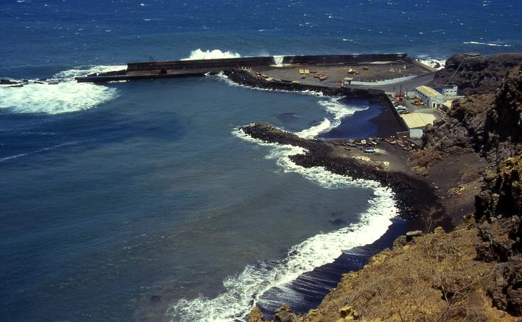 Der Atlantik nagt am Hafen von Vale de Cavaleiros bei dem Inselhauptort Sao Filipe auf der Insel Fogo/Kap Verde.